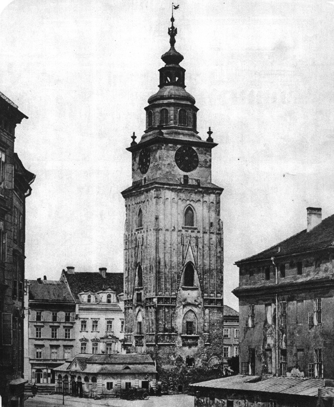 Ratusz ze starym odwachem, z prawe strony fragment Wielkiej Wagi